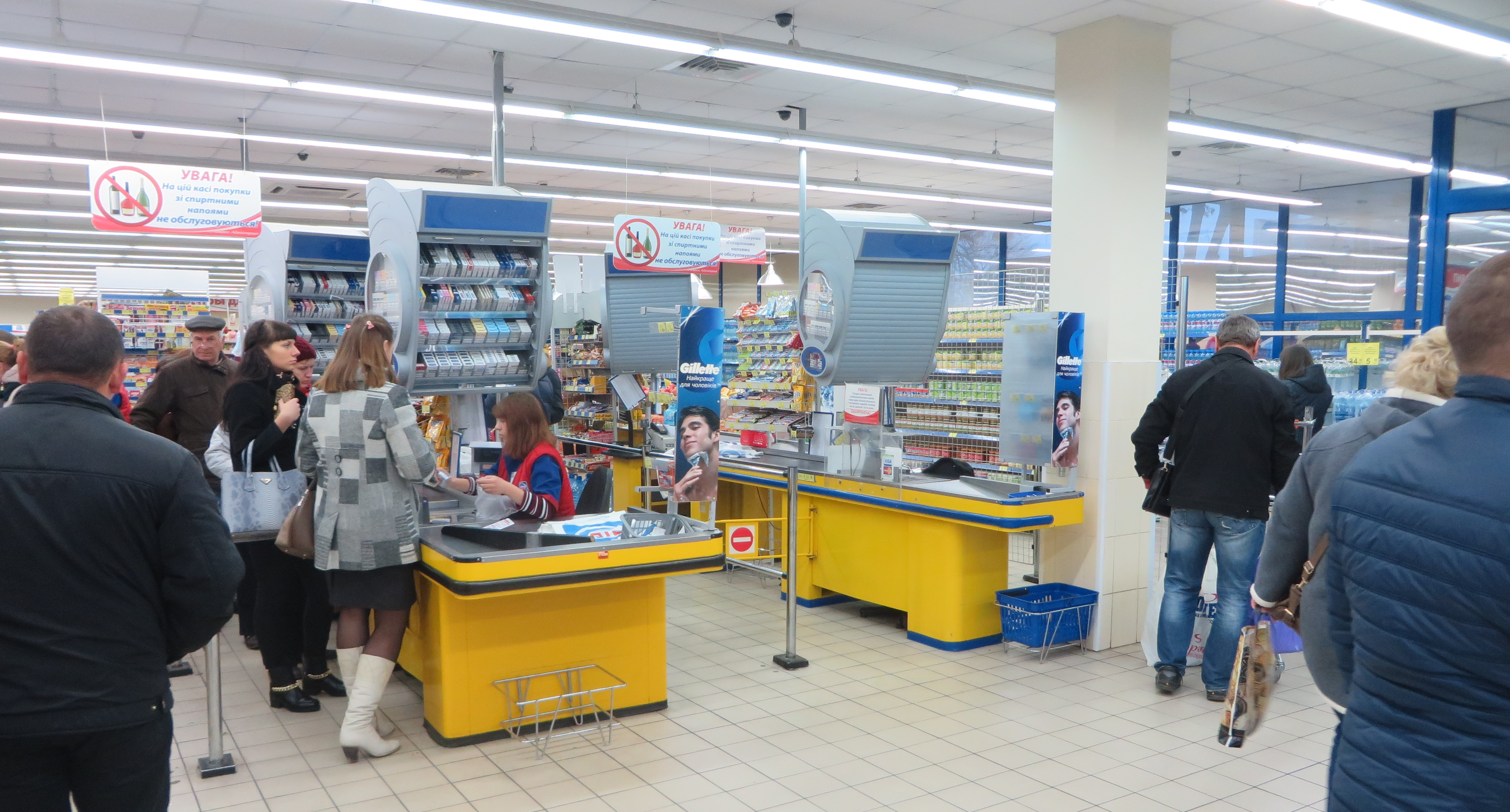 Магазин АТБ, в місті Чернігів, 2014, всередині магазина